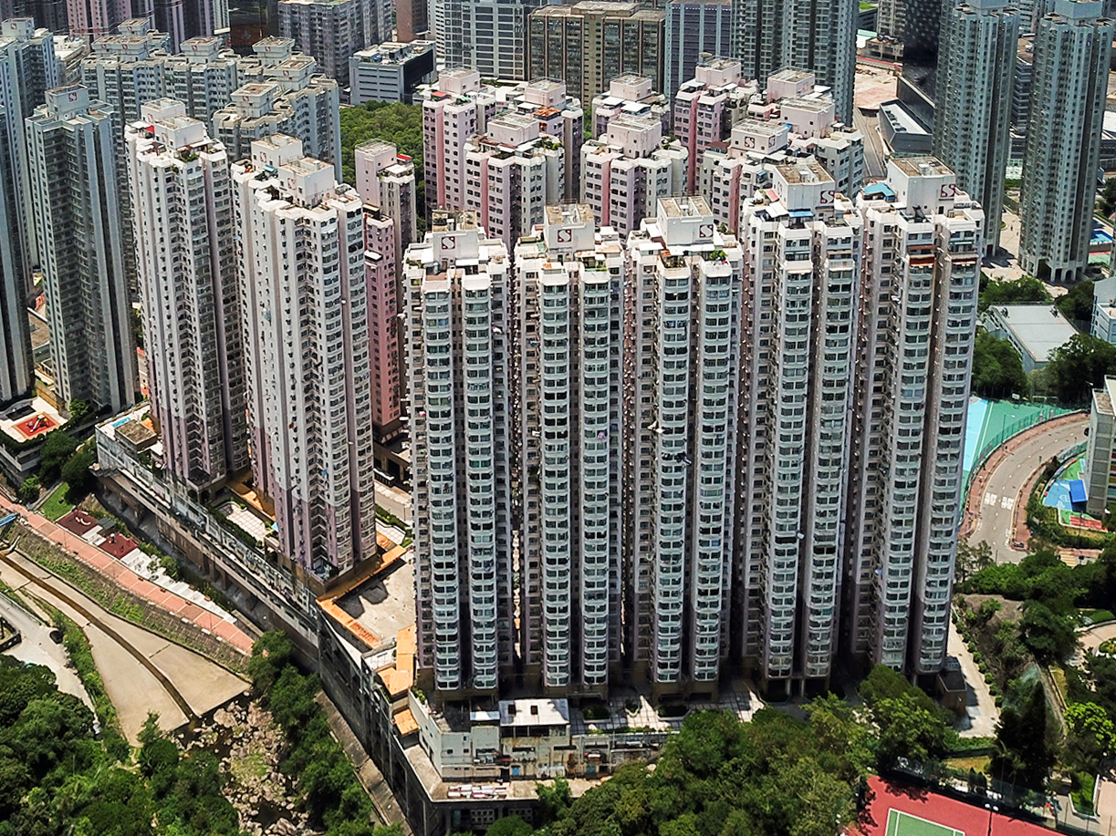 Tsuen Wan Centre